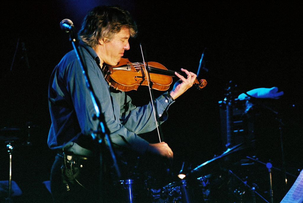 Didier Lockwood at JazzFe 2006